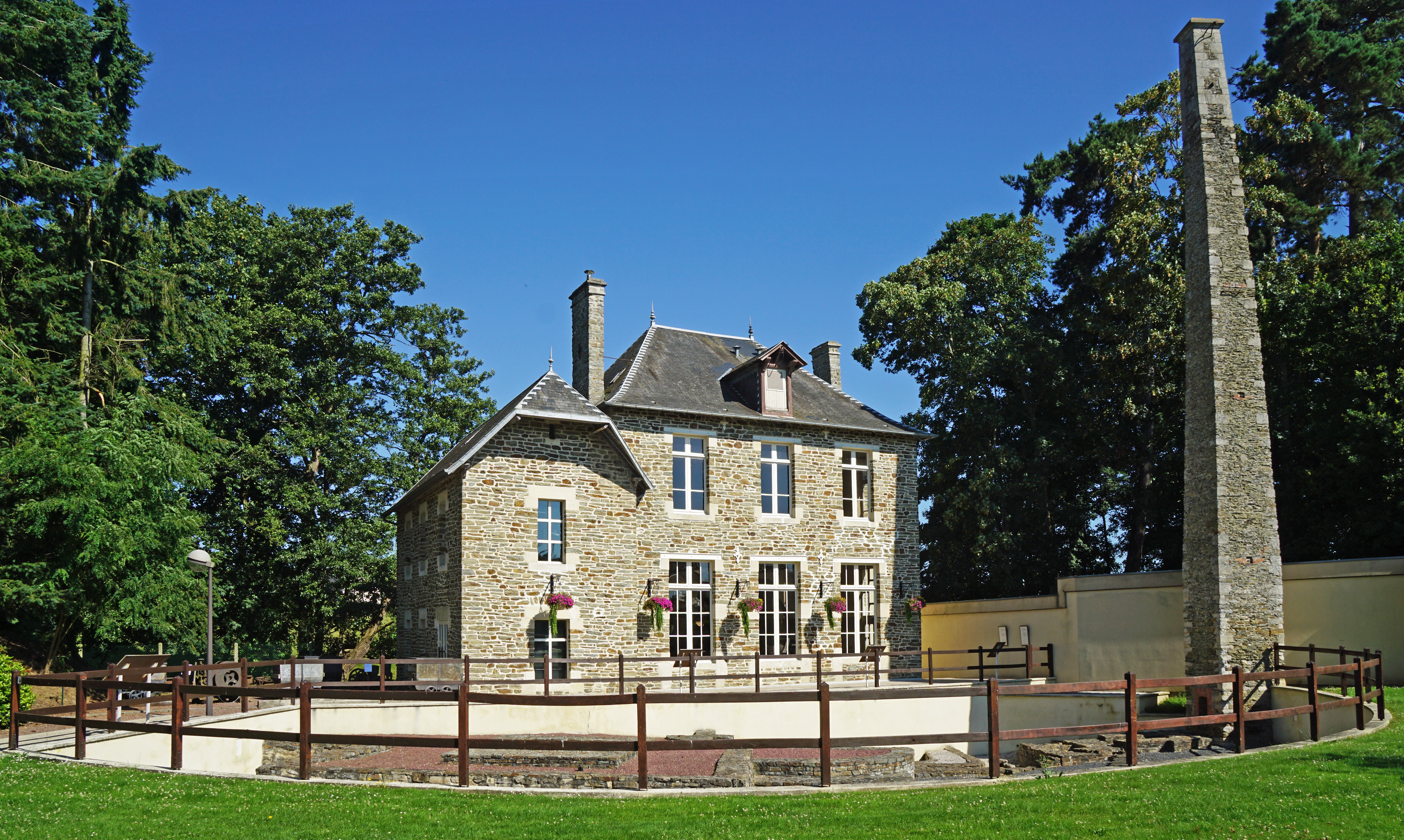 Le musée de la mine du Molay-Littry installé sur le carreau de la fosse Frandemiche dont il subsiste une grande cheminée, des ruines, l’emplacement du puits et deux terrils.